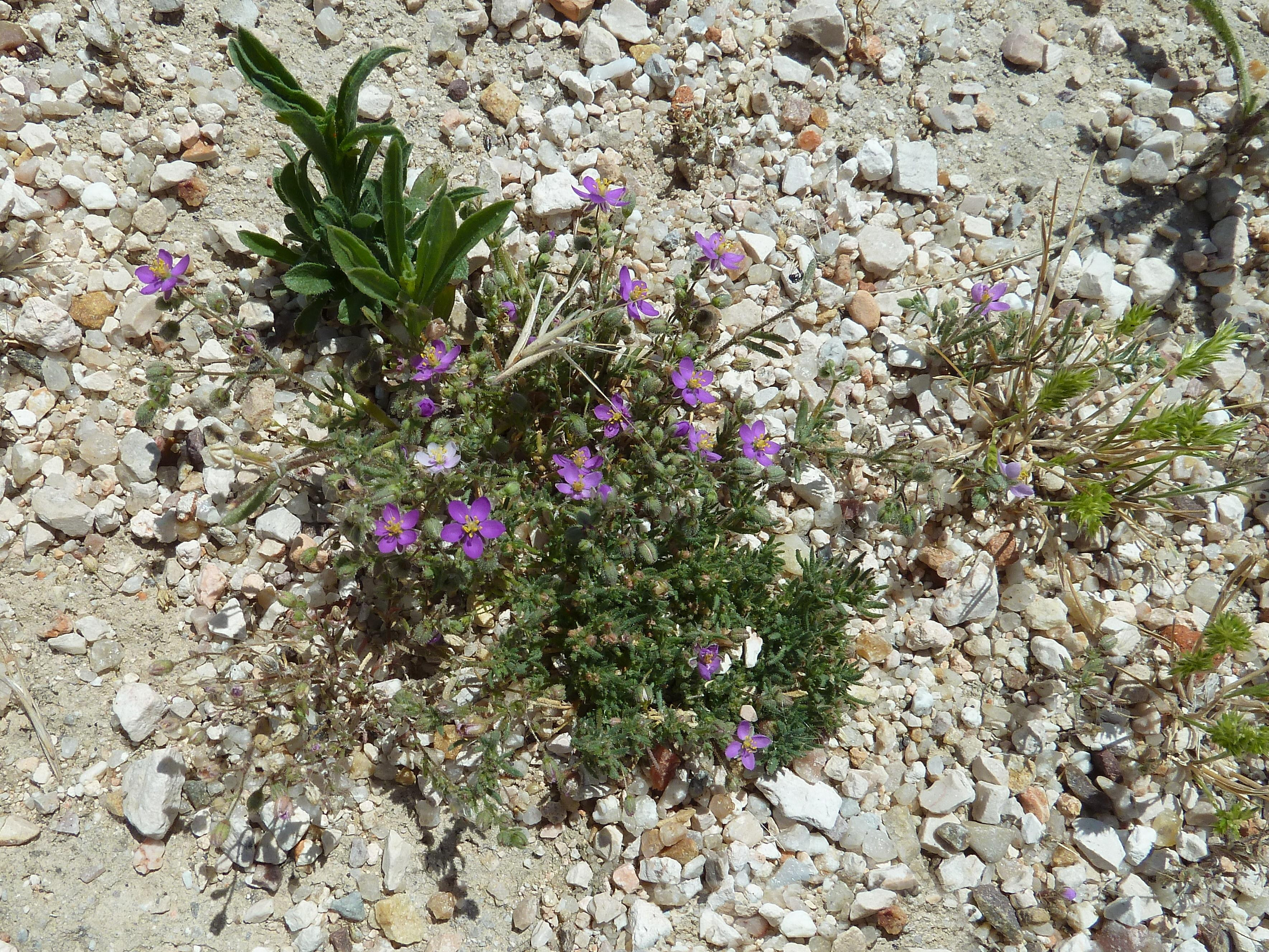 Spergularia rubra (Arenaria roja) : vista general - FFCC Embajadores-Abroñigal (Madrid, España)